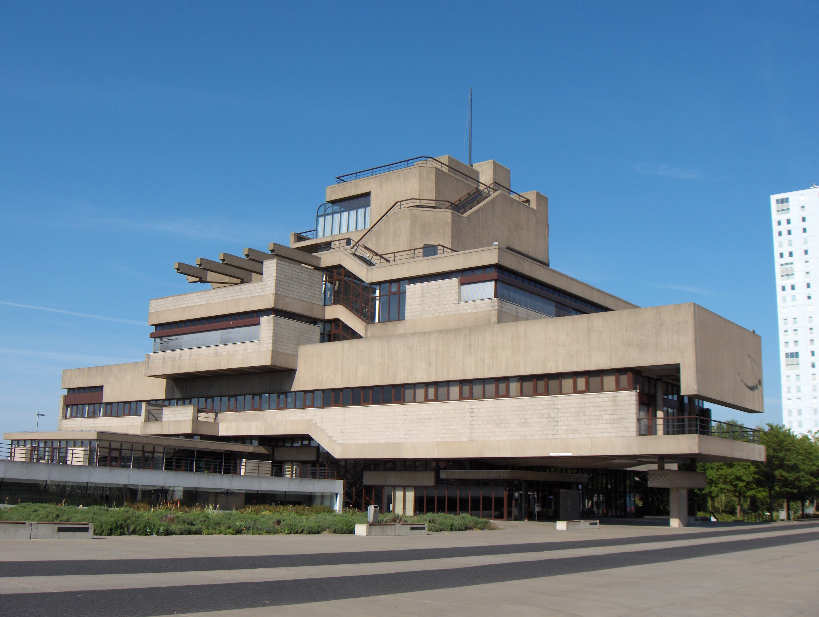 Terneuzen (Niederlande), Rathaus, 1973 errichtet, Pläne: Van den Broek & Bakema.